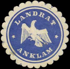 Sealing stamp Title: Landrat Anklam Description: blau, weiß, geprägt Place: Anklam size: 4 cm